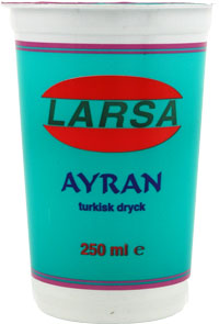 Ayran drickyoghurt från Larsa Foods. Turkisk salt drickyoghurt vanlig till falafel.